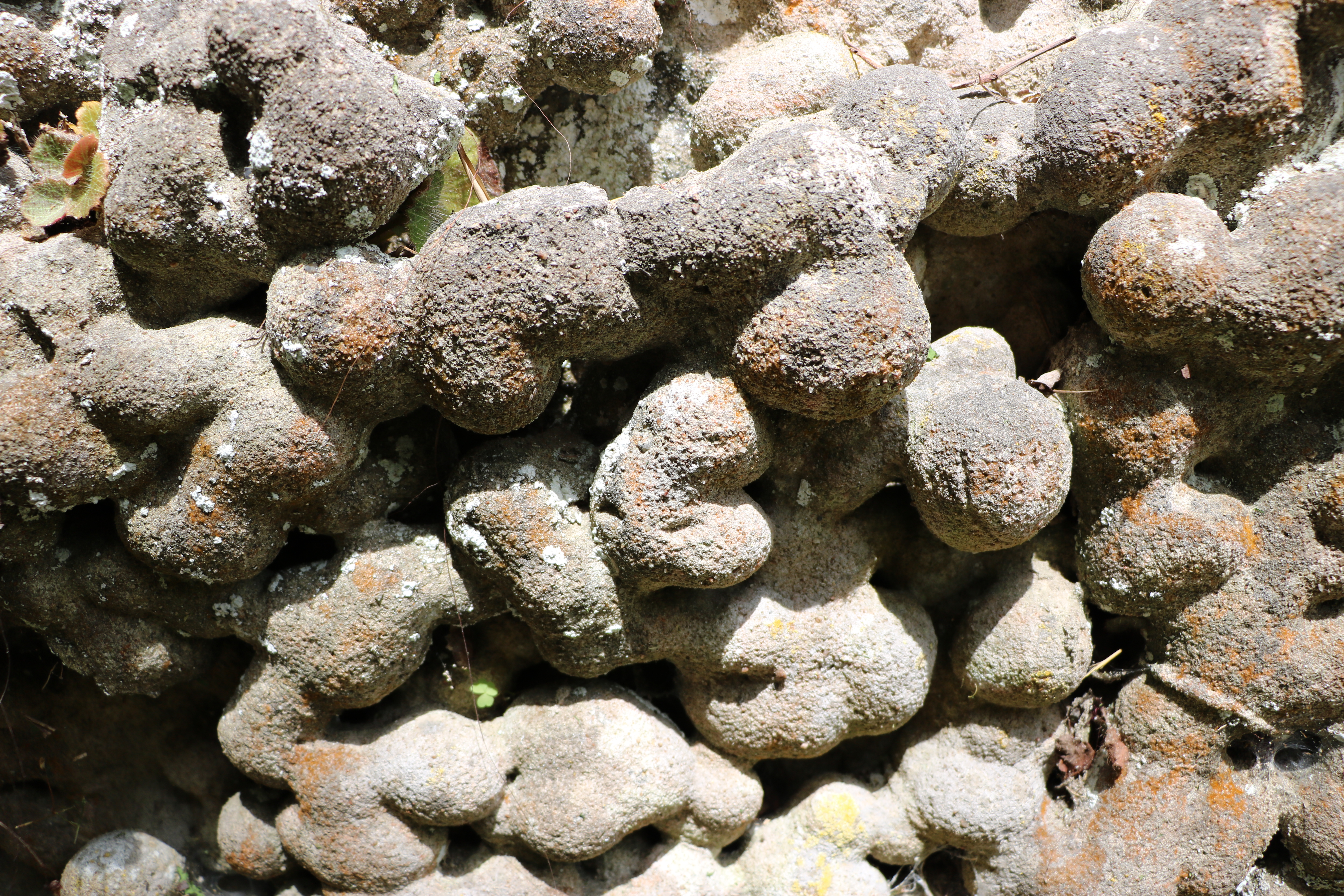 Ikubo no Hyotan-ishi. Stone nodules in natural monument of Japan. Himi,Toyama.